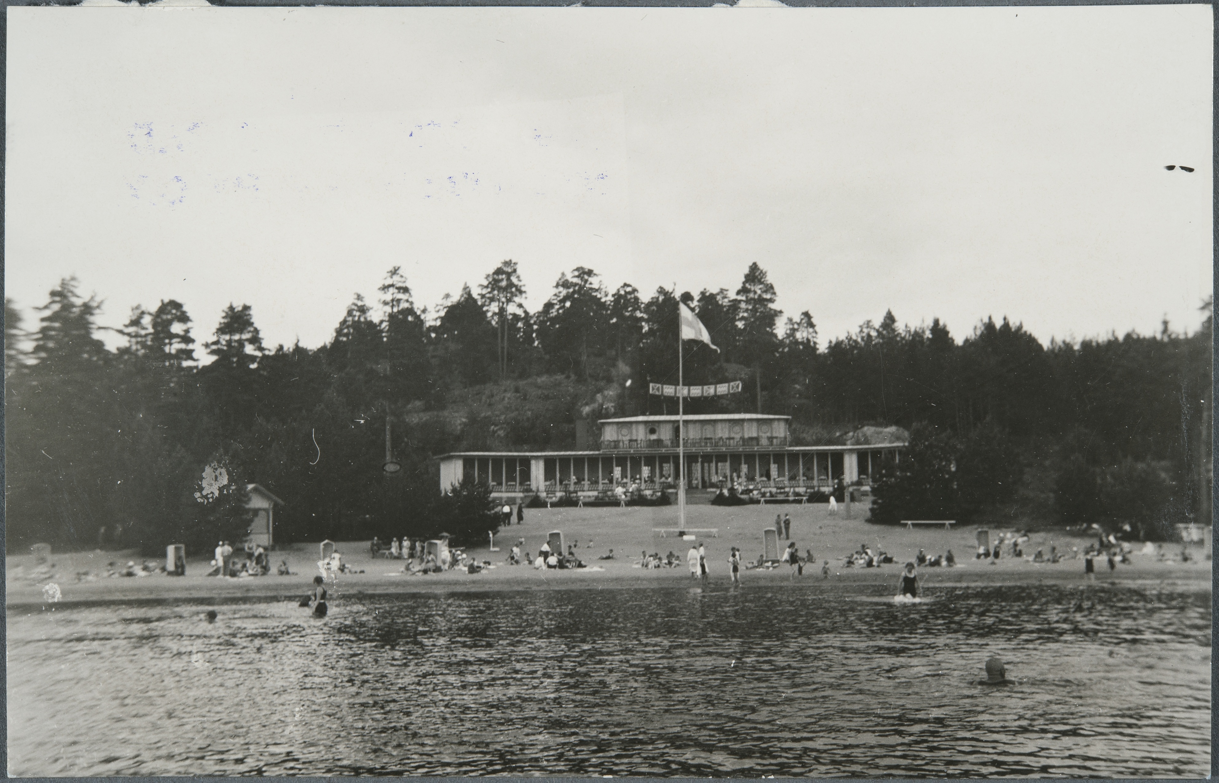 Tupavuoren merikylpylä oli Naantalissa Naantalinsalmen rannalla sijainnut merikylpylä, joka toimi vuodesta 1918 1940-luvulle. Kuvan arkistotiedot: Tupavuoren merikylpylä vaaka, mustavalkoinen Aineistotyyppi: Kuva Aiheen paikka: Naantali Aiheen aika: viimeistään 1931 Organisaatio: Museovirasto Kokoelma: Historian kuvakokoelma Inventaarionro: HK19731119:5951 Kuvaustiedot: viimeistään 1931 Naantali